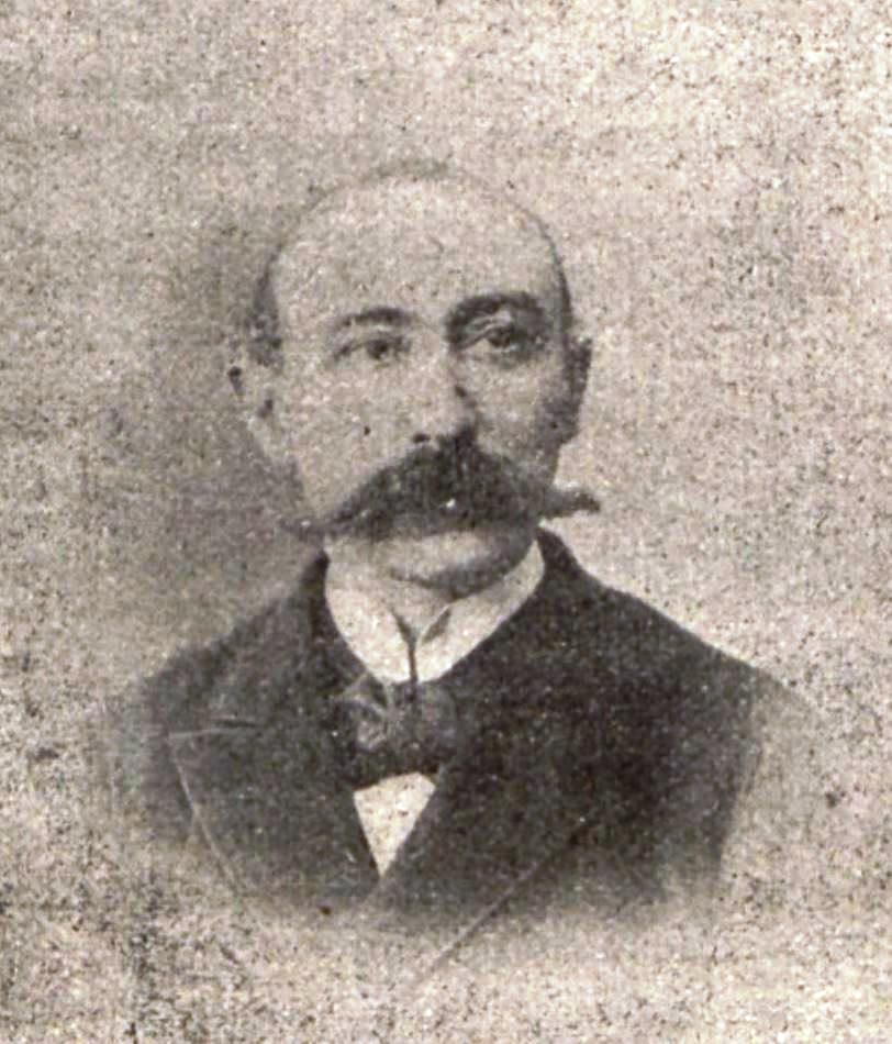 "Frédéric Plessis, maître de conférences à l’École normale supérieure, membre de la Patrie Française".